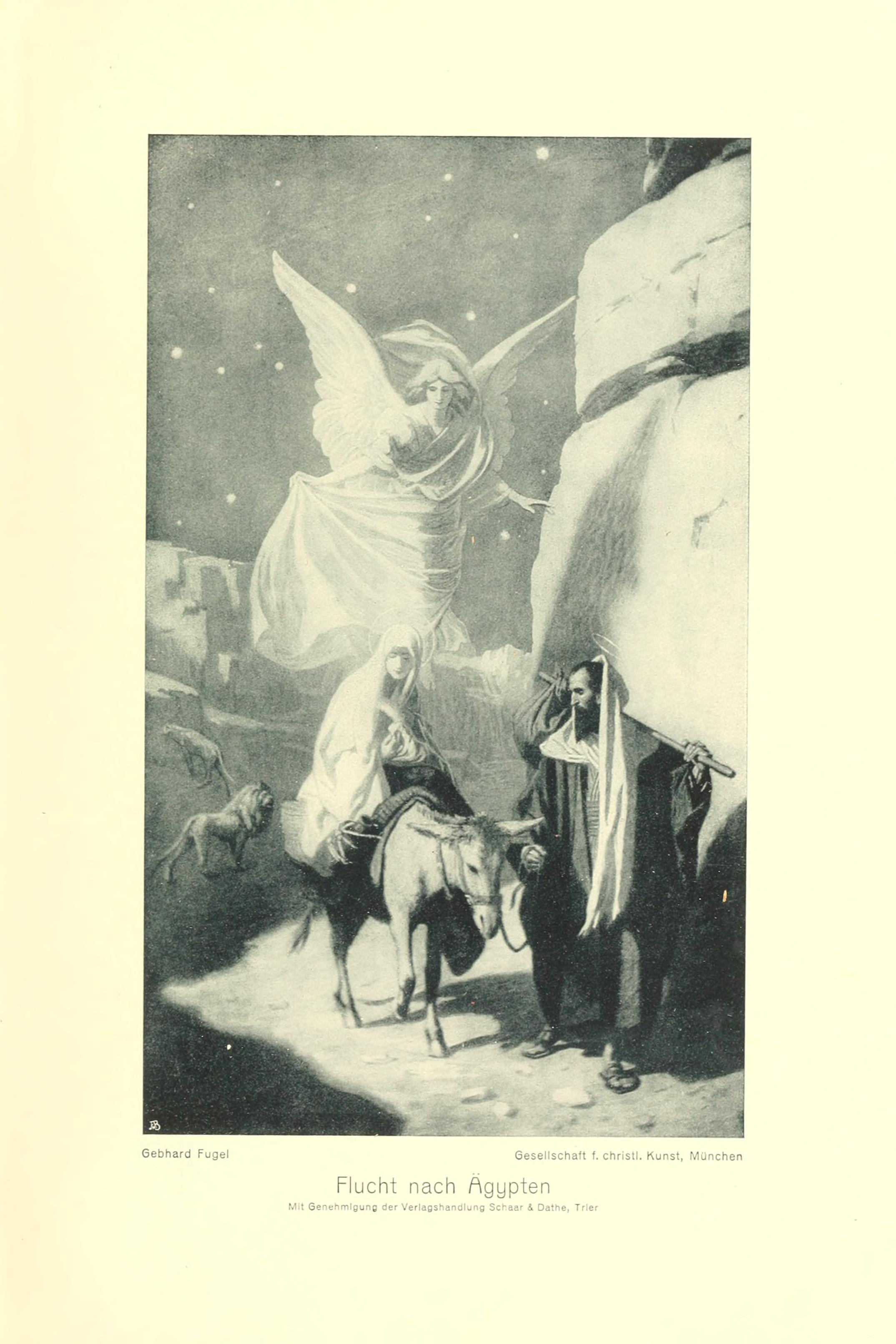 Artikel „Gebhard Fugel“ von Oscar Doering-Dachau, mit Abbildungen im Text sowie weitere Abbildungen von Fugels Werken in: Die Christliche Kunst, 6. Jg. 1909–1910, VI. Heft (Februar 1910)